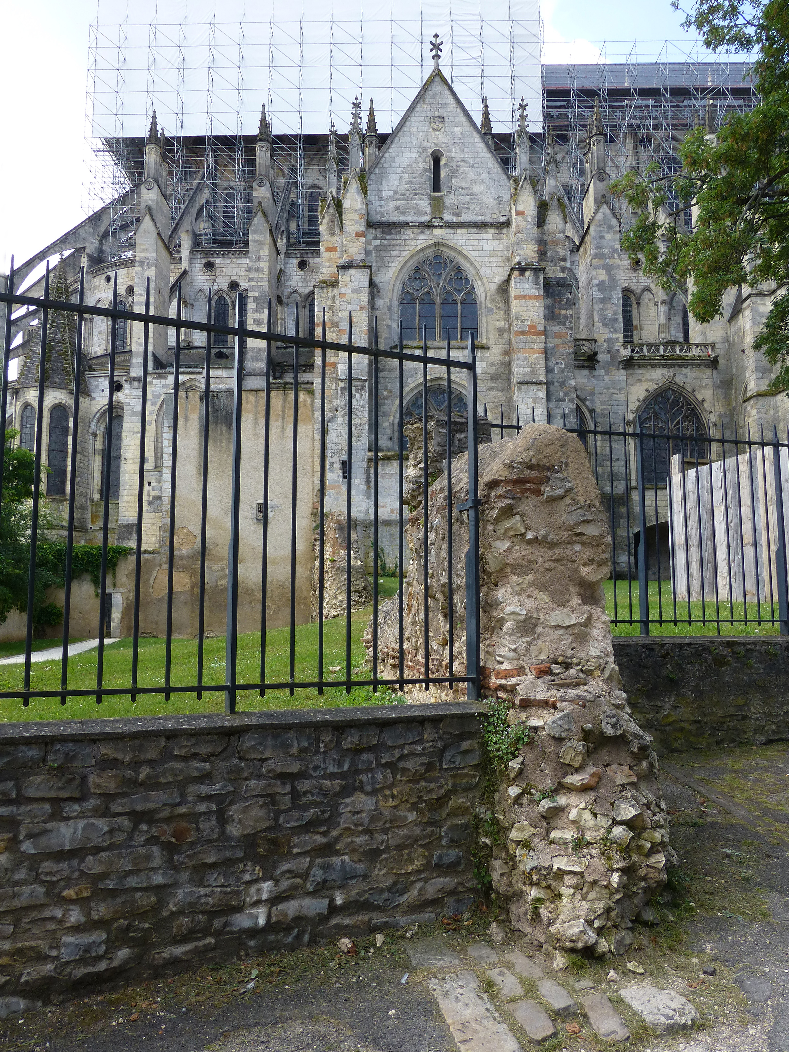 Bourges (Cher) : vestiges du rempart gallo-romain au pied de la cathédrale